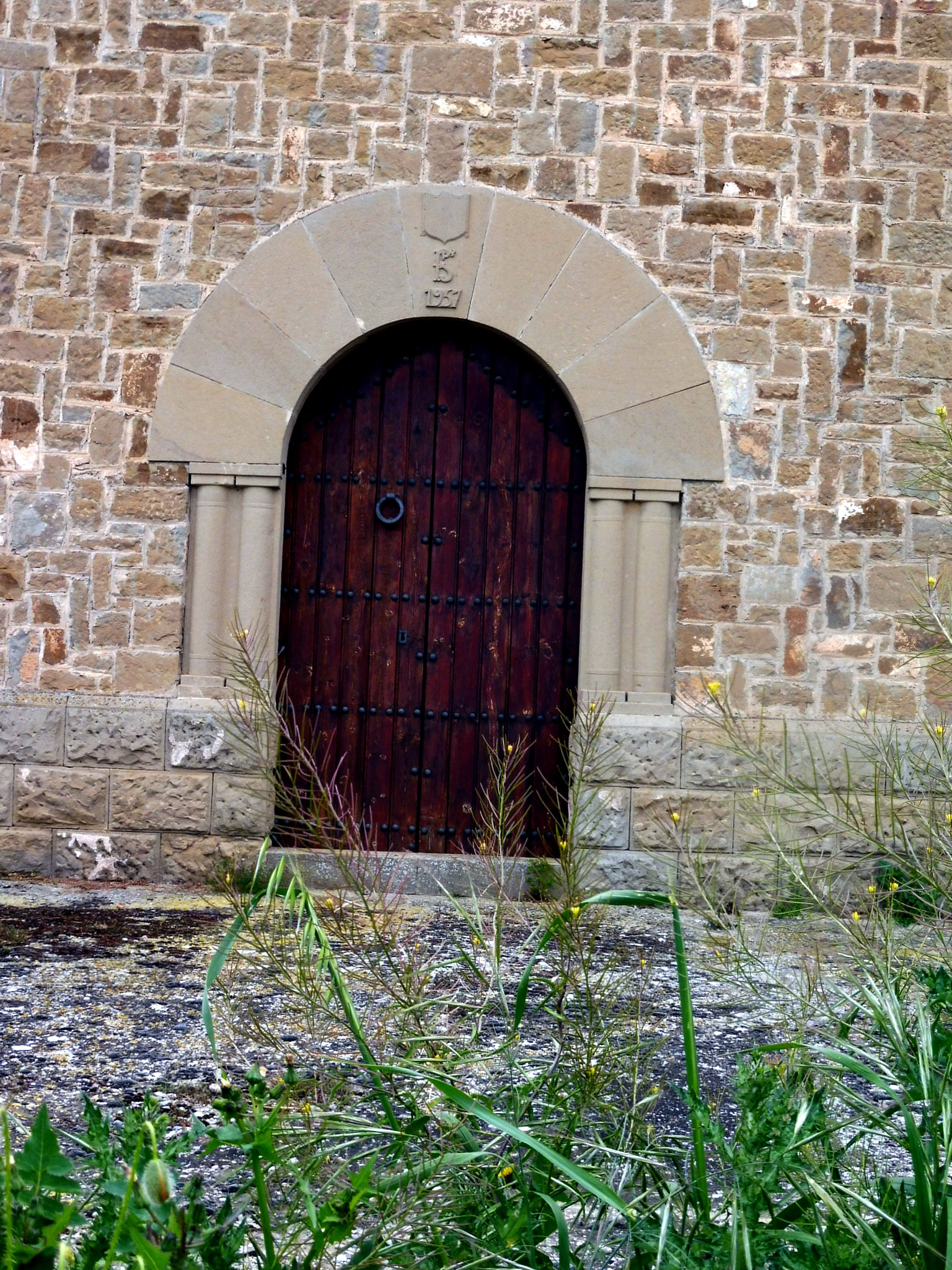 Mas d'en Porta (Guissona): portal a la façana oest This is a a photo of a natural area in Catalonia, Spain, with id: ES510216